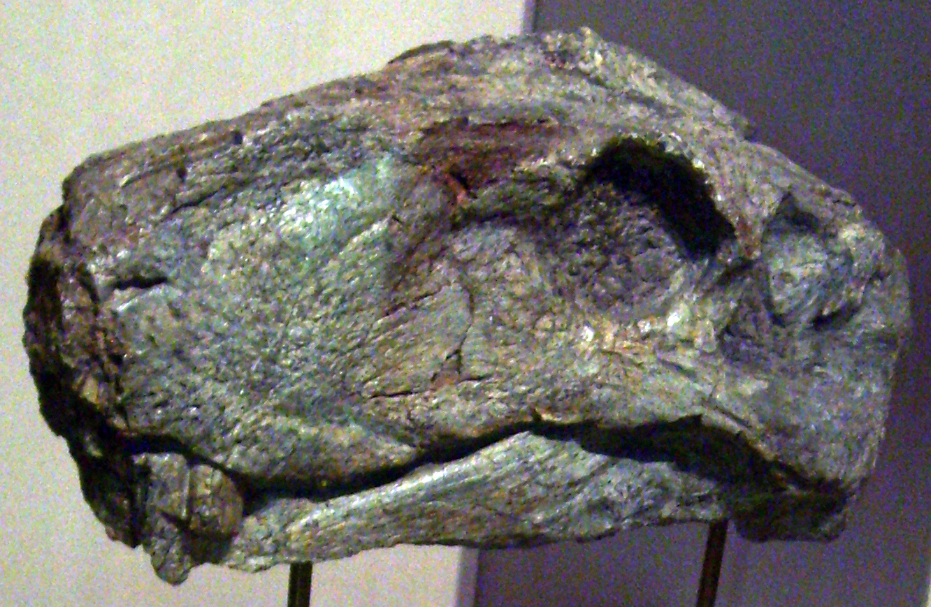 Aelurognathus sp. skull at the Museum für Naturkunde, Berlin.